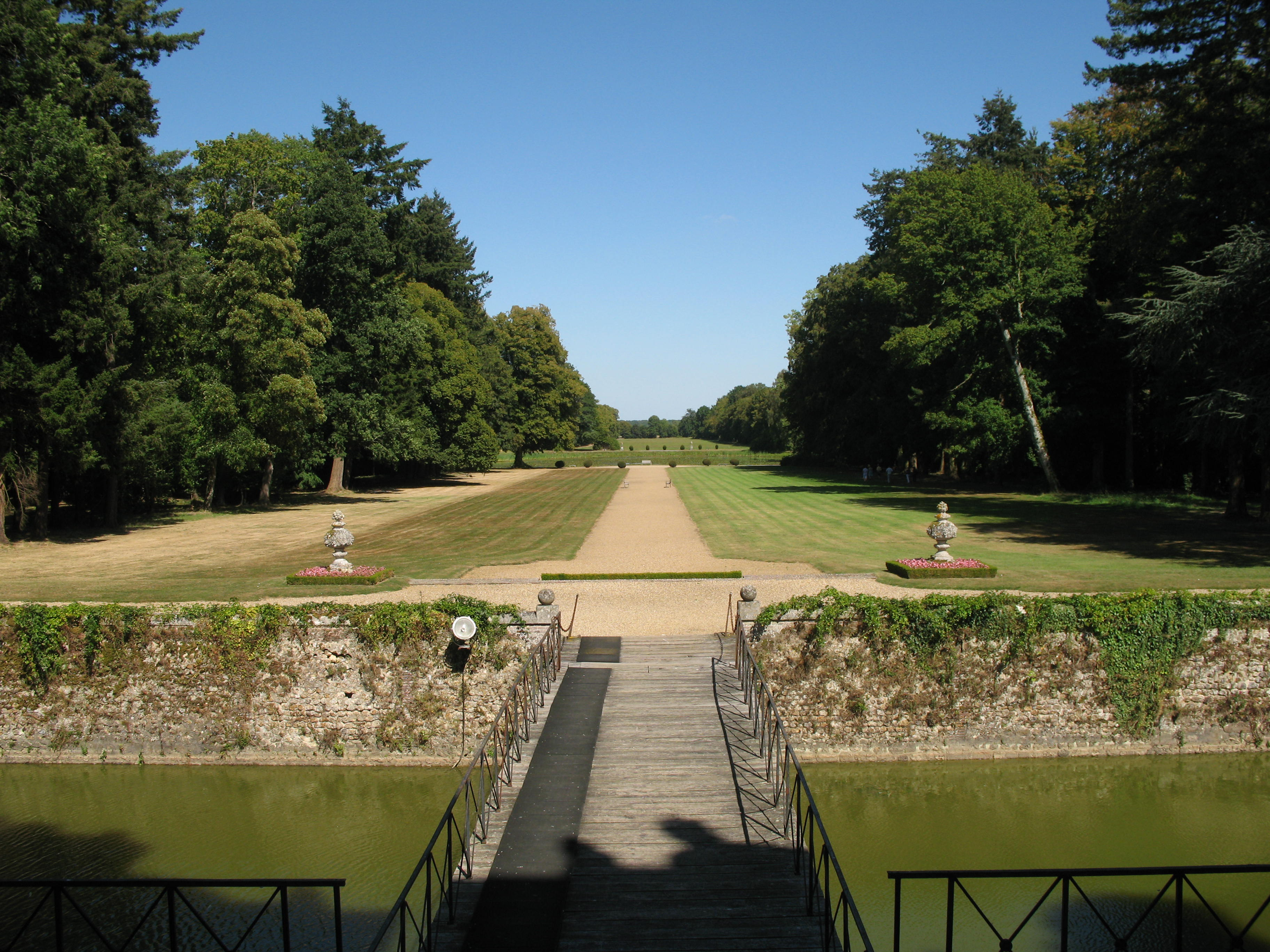 Château de Beaumesnil, à Beaumesnil dans l'Eure